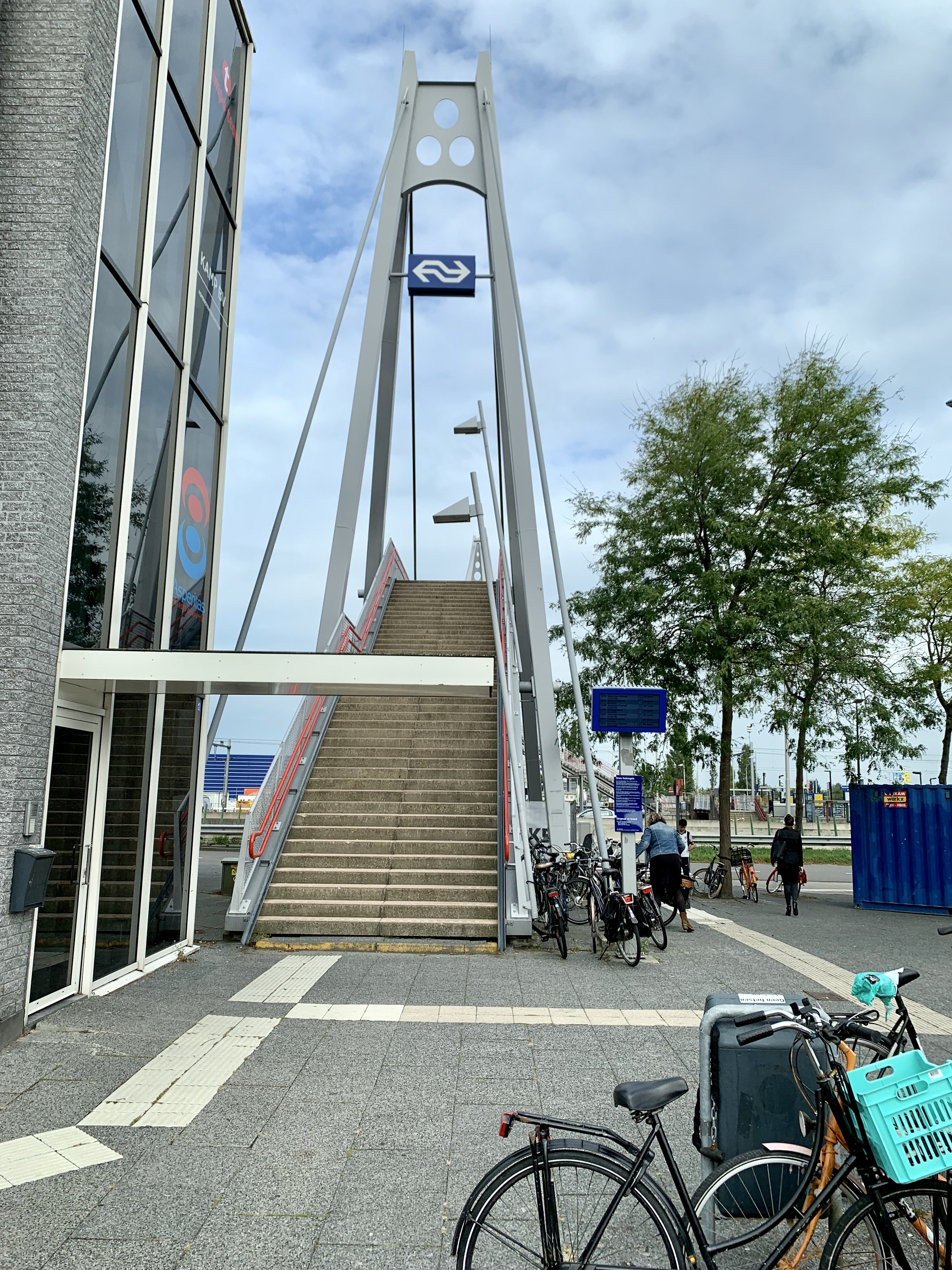 De Traverse bij Station Haarlem Spaarnwoude zoals voor de renovatie in oktober 2019